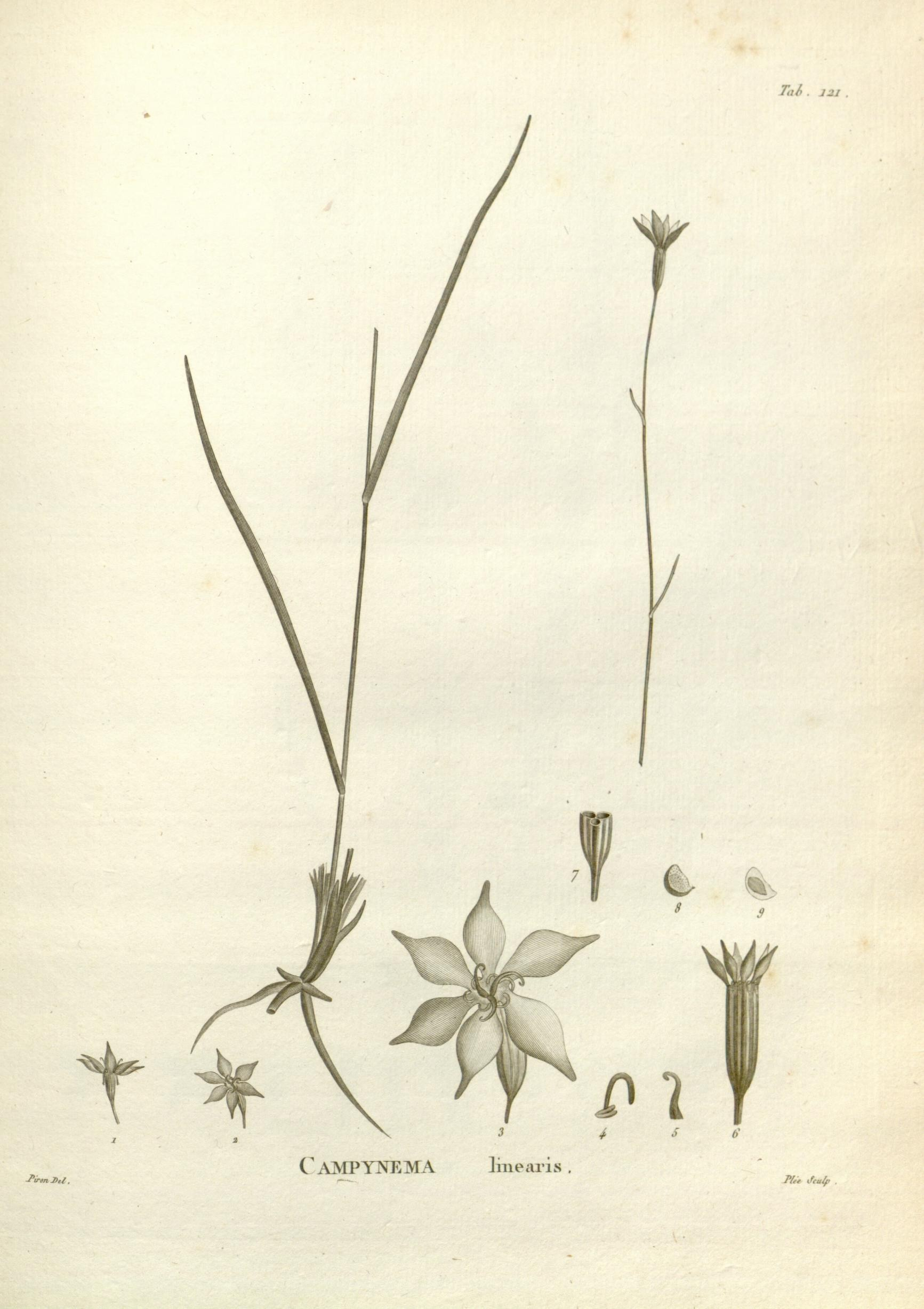 ^ CAMPYNEMA Imea